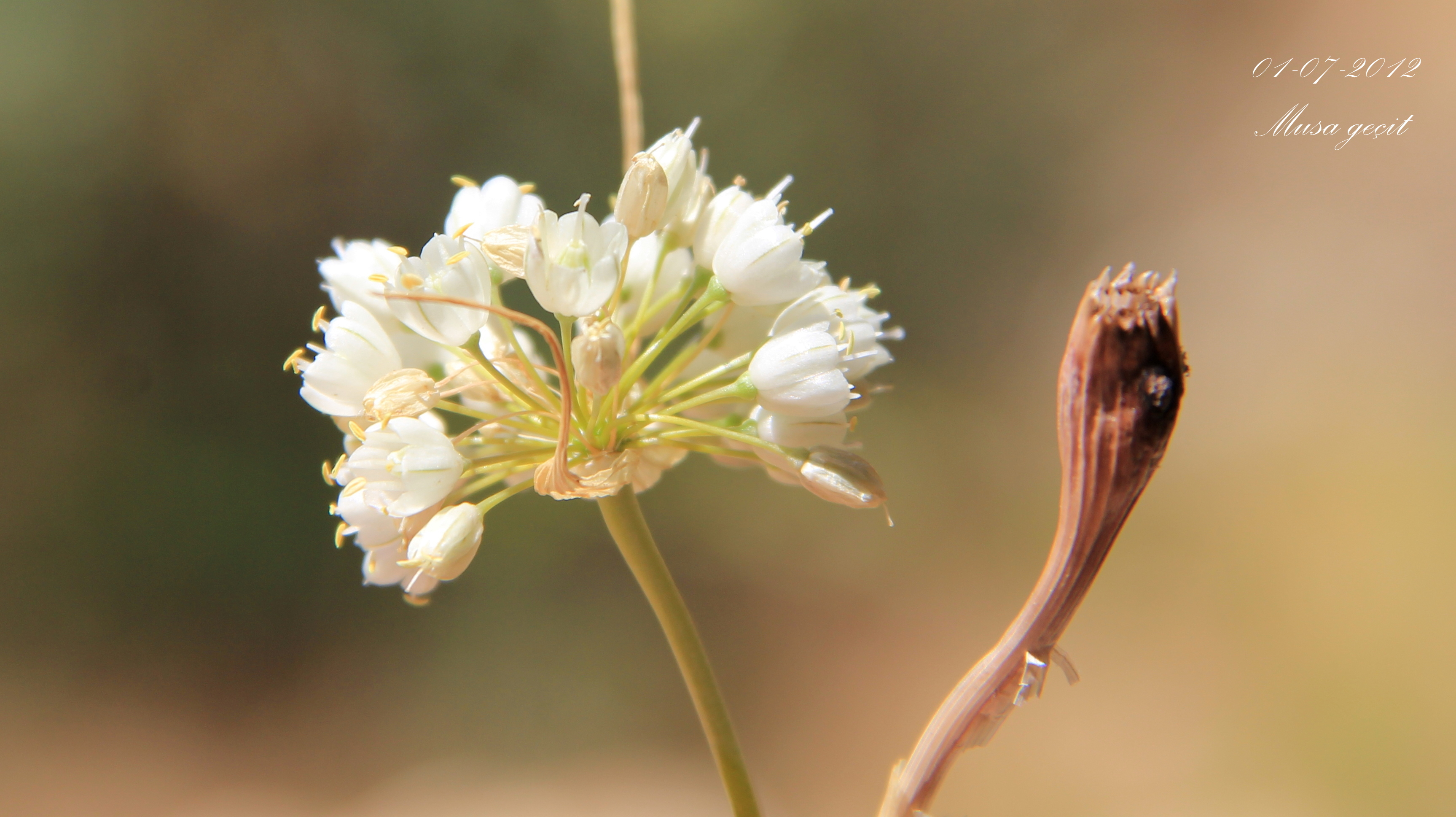 Yer:Mardin/Allium pallens